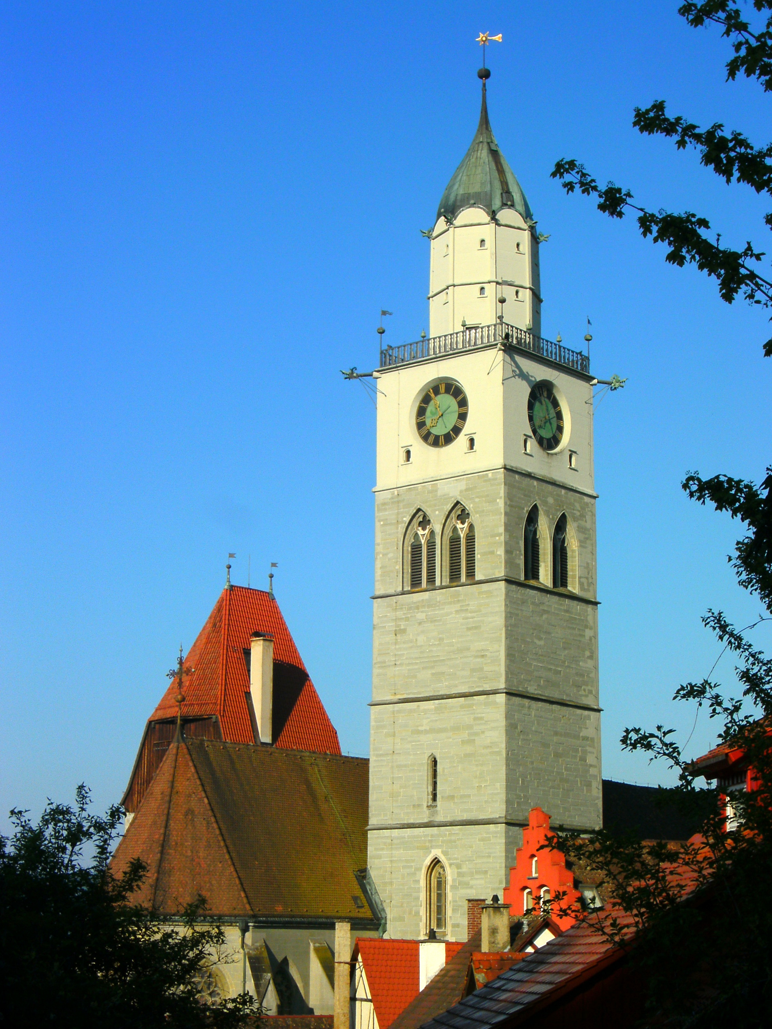 Überlingen Münsterturm